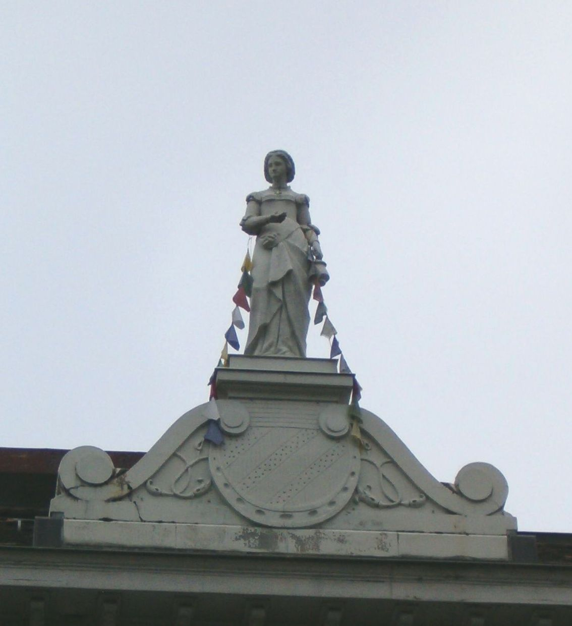 Hotel Verenahof, Details.